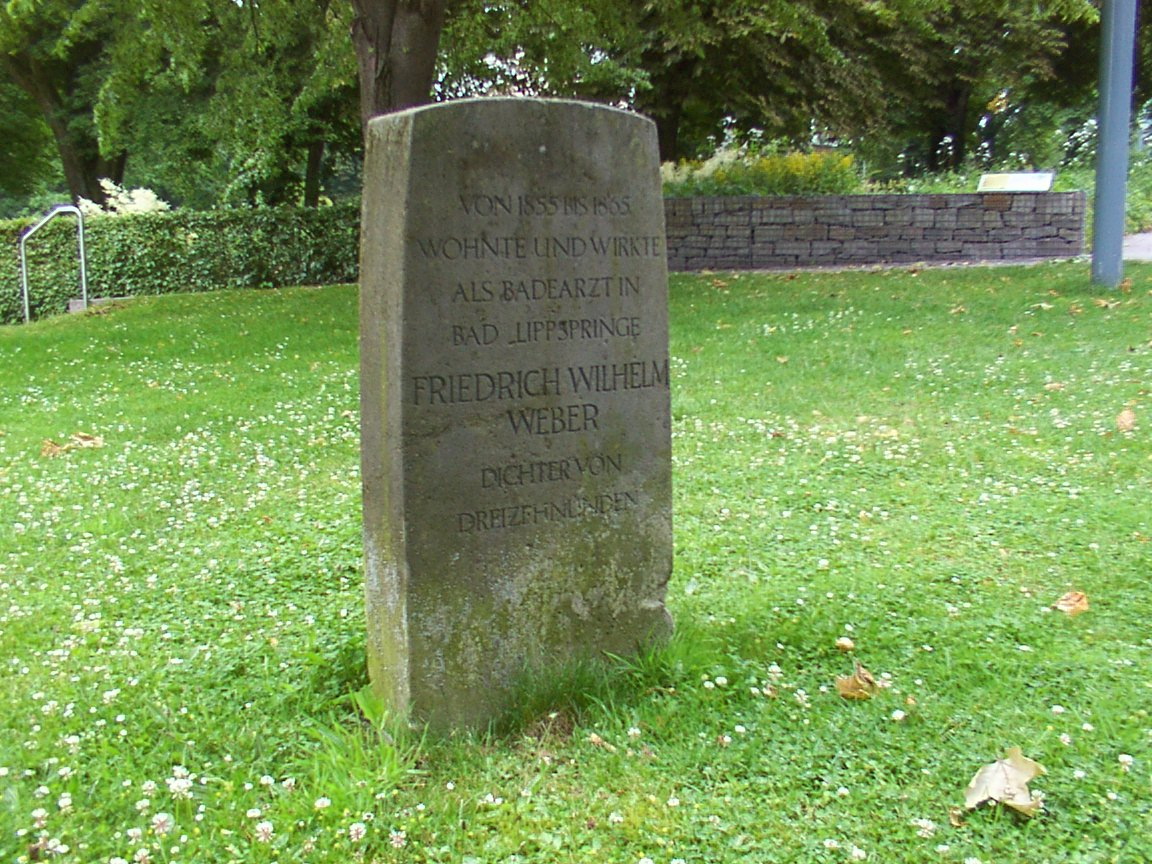 Bad Lippspringe: Gedenkstein Friedrich Wilhelm Weber Inschrift: VON 1855 BIS 1865 / WOHNTE UND WIRKTE / ALS BADEARZT IN / BAD LIPPSPRINGE / FRIEDRICH WILHELM / WEBER / DICHTER VON / DREIZEHNLINDEN